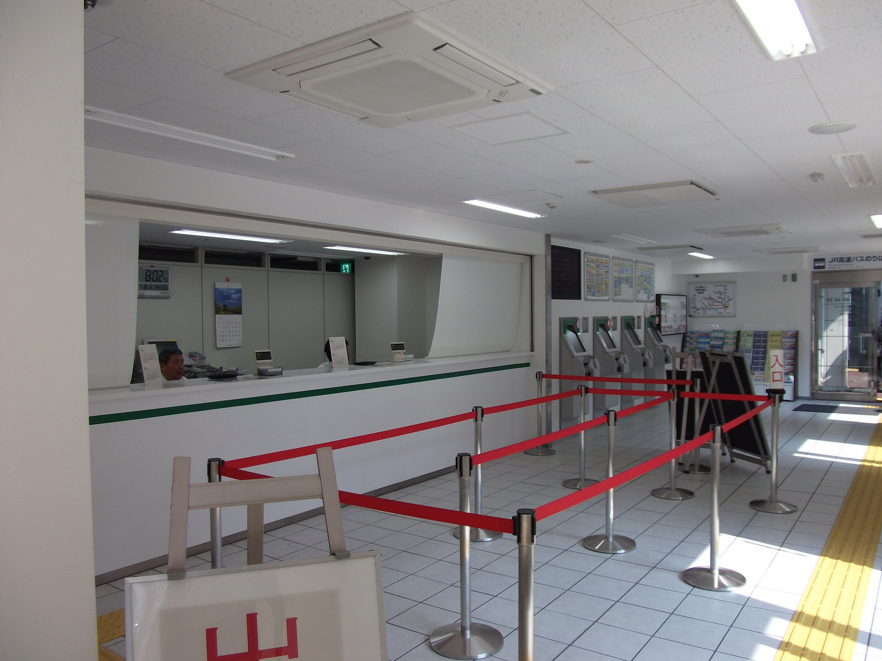 新宿駅JR高速バスターミナルの切符売り場。